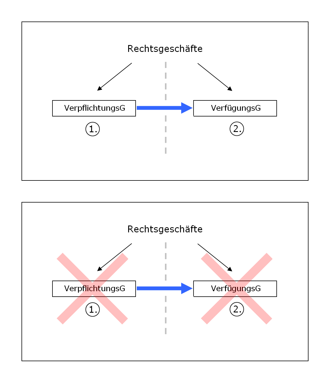 Kausalprinzip im Zivilrecht